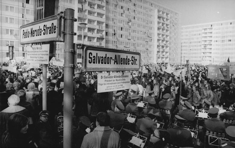 Berlin, Pablo-Neruda-Straße, Salvador-Allende-Straße ADN-ZB Reiche 3.11.73 Berlin: Köpenicker Straßen erhielten Namen chilenischer Patrioten. Zu einer eindrucksvollen Kundgebung der Solidarität mit dem chilenischen Volk vereinten sich am Sonnabendvormittag (3.11.73) Berliner Bürger im Neubaugebiet des Stadtbezirks Köpenick. Während des Meetings wurden zwei Straße des Arbeiter-Wohngebietes südlich der Müggelspree in Salvador-Allende-Straße und in Pablo-Neruda-Straße umbenannt. (siehe ADN-Meldung Nr. 13.10 vom 3.11.73)